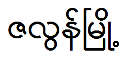 залун